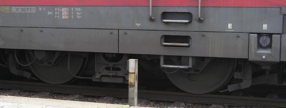 Das Drehgestell unter dem 1. Führerstand der Baureihe 101 der DB AG in Nürnberg